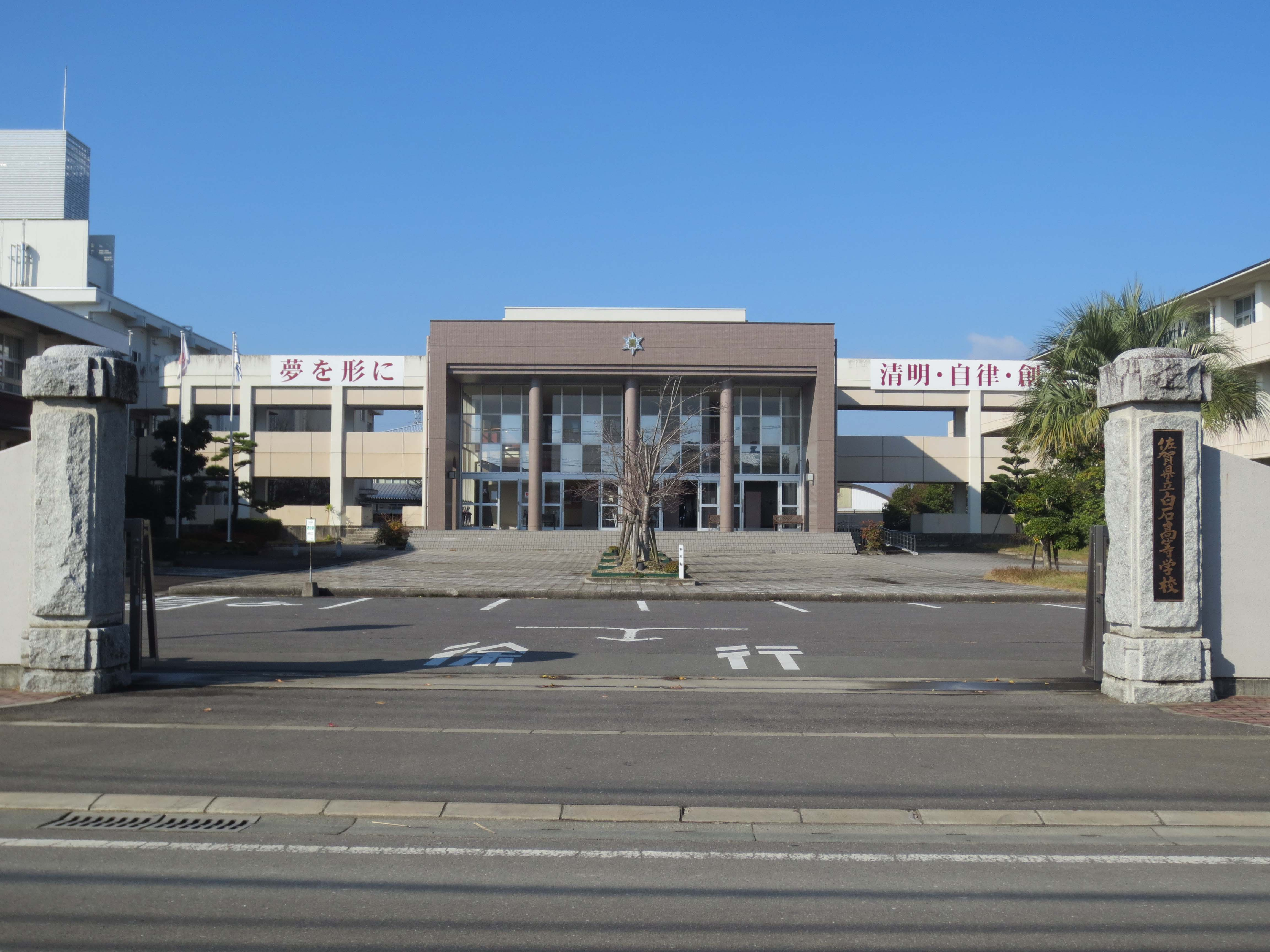 佐賀県立白石高等学校（佐賀県杵島郡白石町）